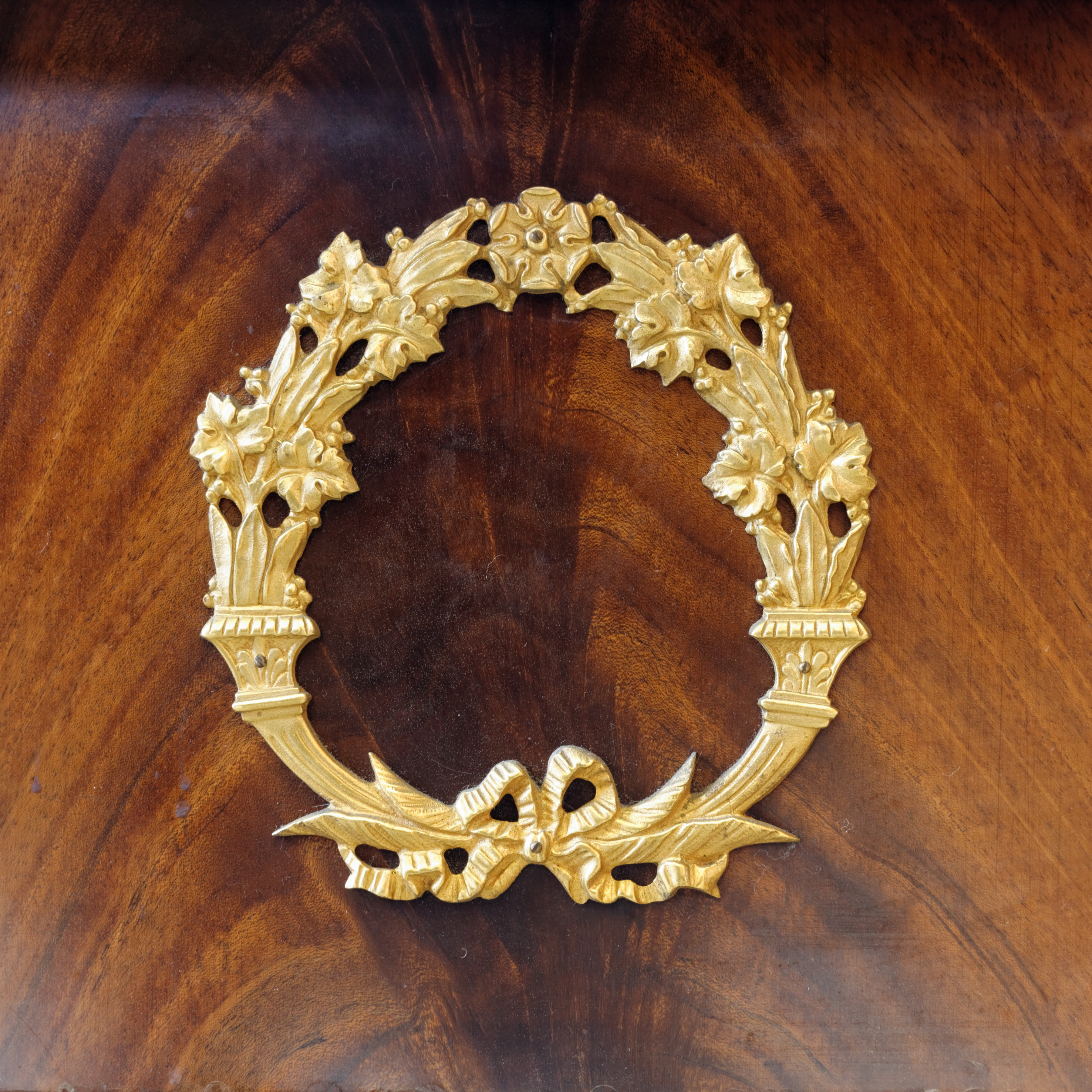 Mobilier du bureau du maire, dans la mairie du 10e arrondissement de Paris.